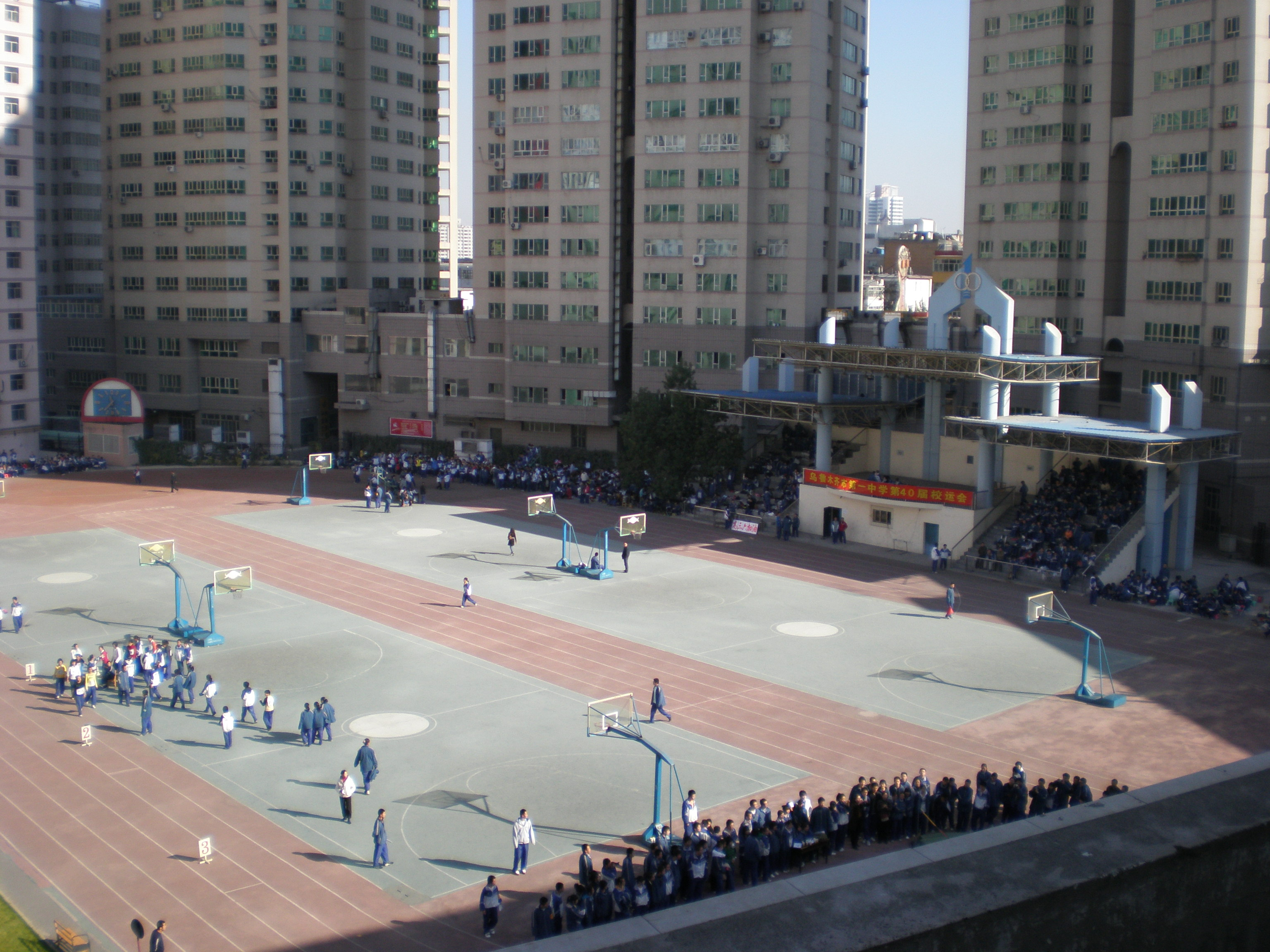 Panorama of school playground Urumqi No.1 High School, 2007 乌鲁木齐市第一中学校园全景